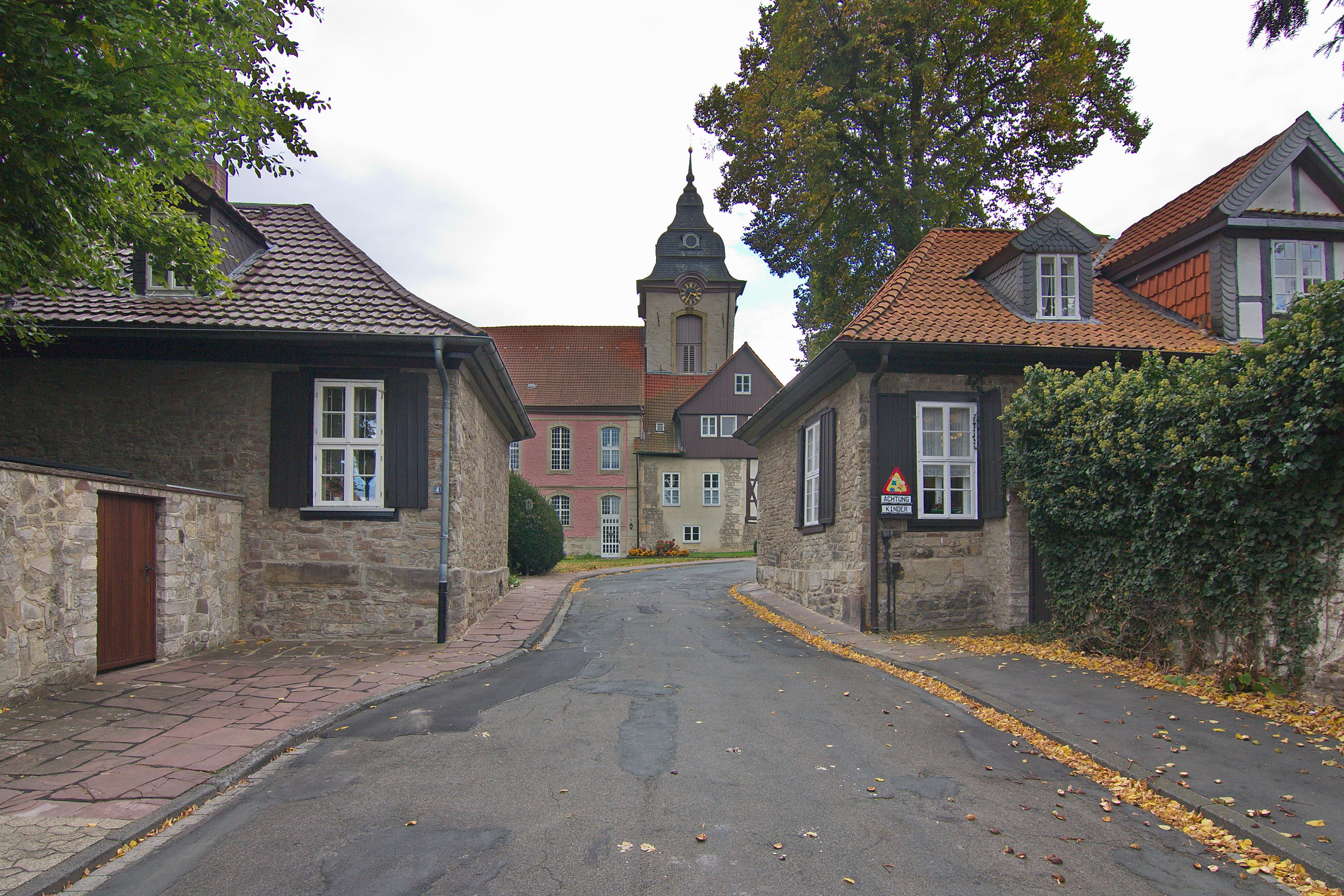 Das Stift Steterburg ist ein ehemaliges Kanonissenstift, späteres Augustiner-Chorfrauen-Stift und ehemaliges evangelisch-lutherisches Frauenstift in Salzgitter-Thiede, in Niedersachsen. Erhaltene Gebäudeteile sind aus dem 11. Jahrhundert. Das Wohnhaus der Äbtissin entstand 1691. Die Stiftskirche ist 1752 errichtet worden.